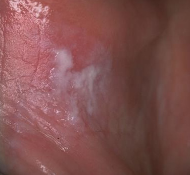 Ерозивне промене у устима код Дискоидног еритемског лупуса, 08.н0вембар 2009.